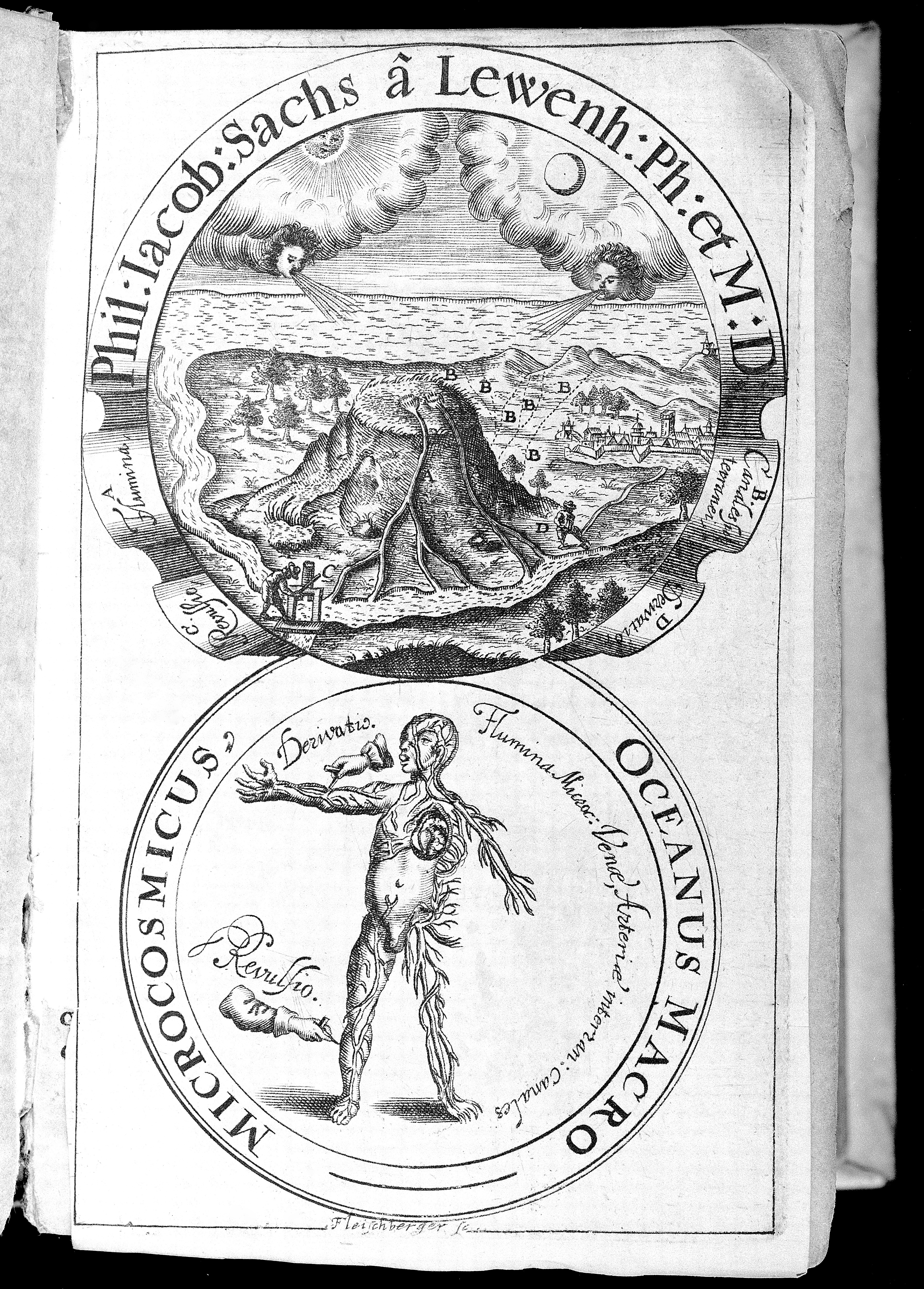 Frontispiece diagram. Rare Books